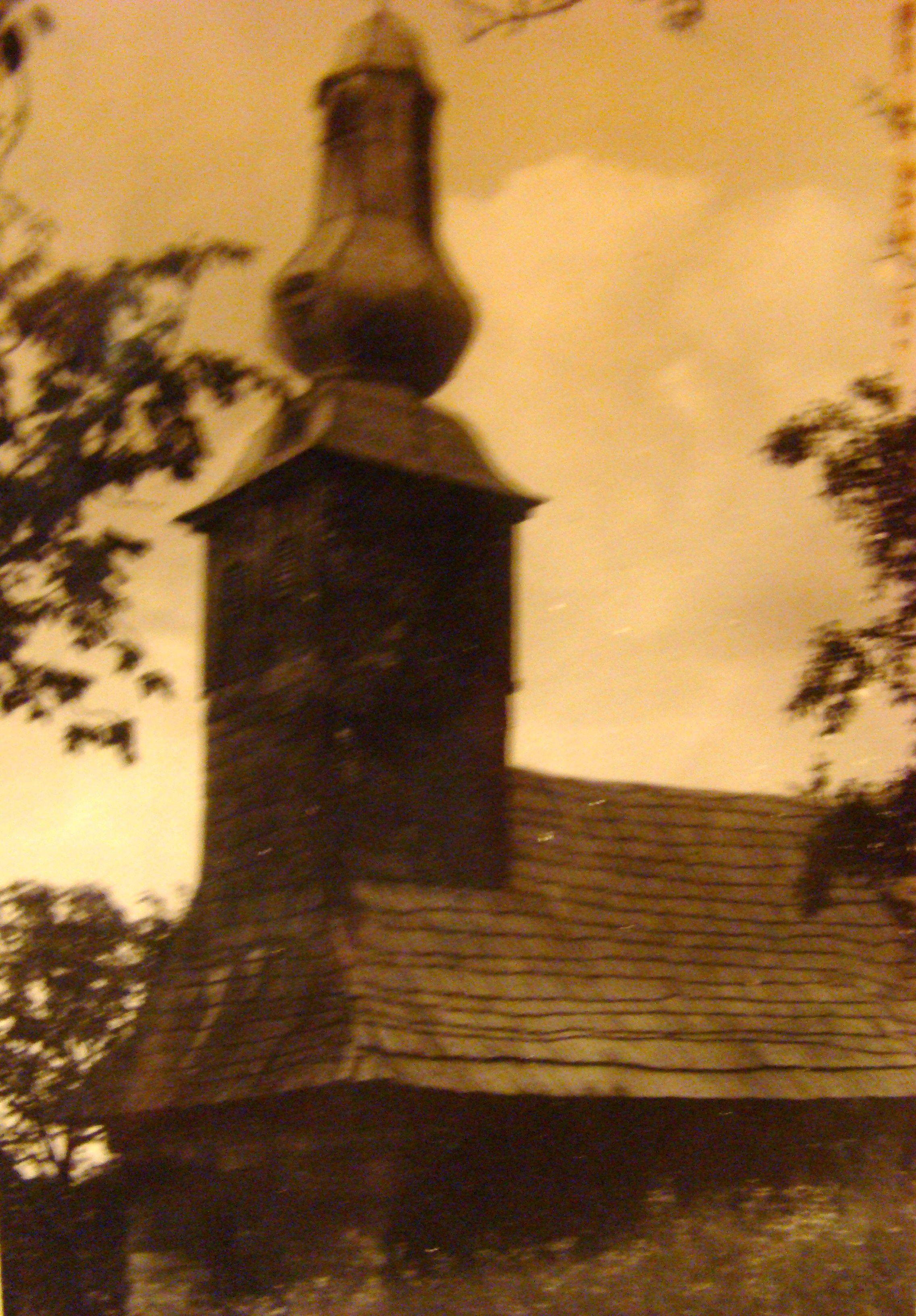 Biserica de lemn din Budeşti, judeţul Arad